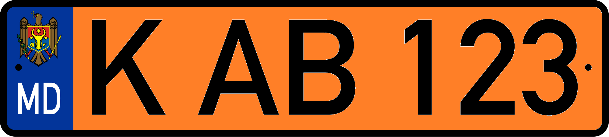 Номерной знак пассажирских транспортных средств Молдавии с марта 2014 года.